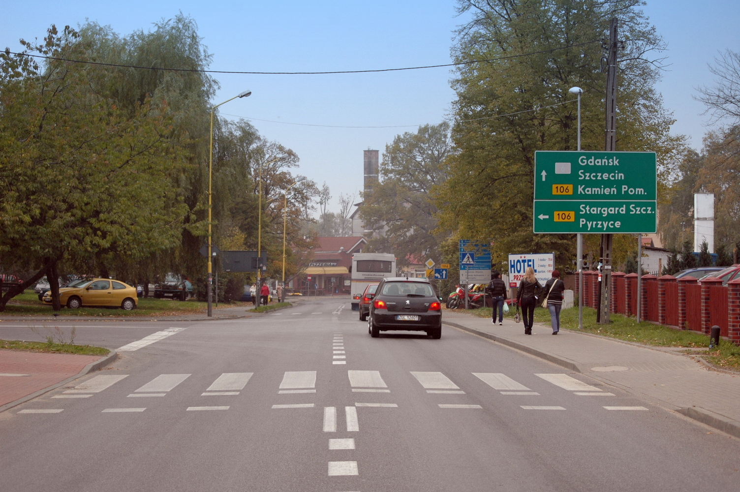 Ulica Bohaterów Warszawy, a jednocześnie droga wojewódzka nr 106 w Nowogardzie.